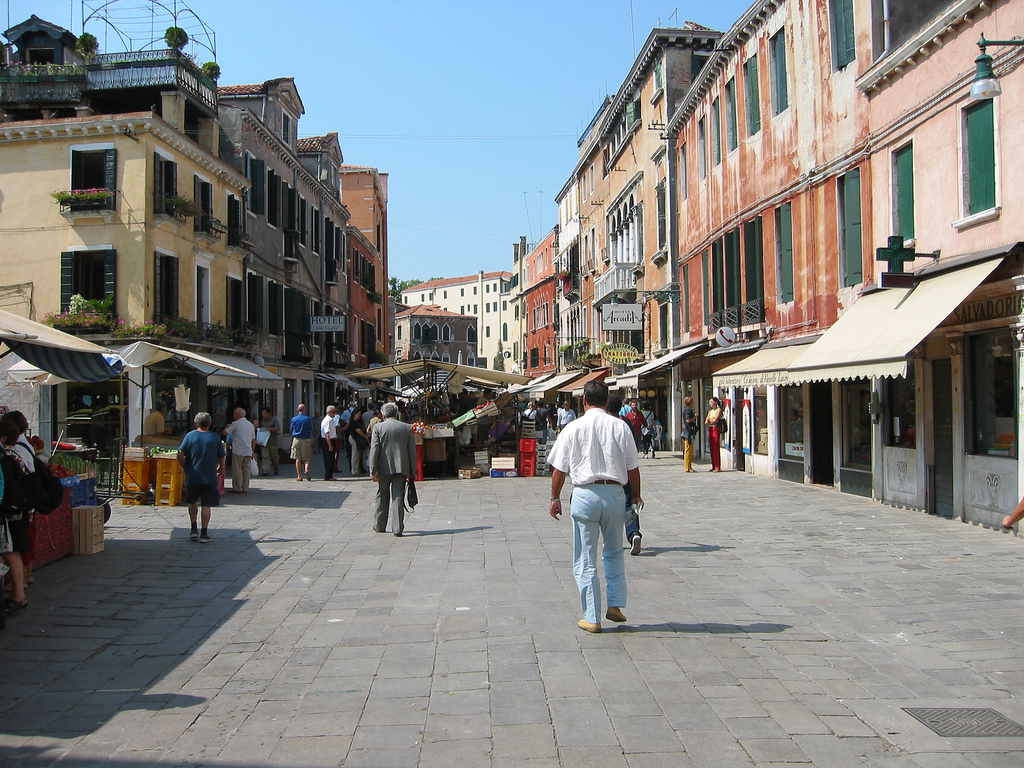 Strada, Venezia, Italy.